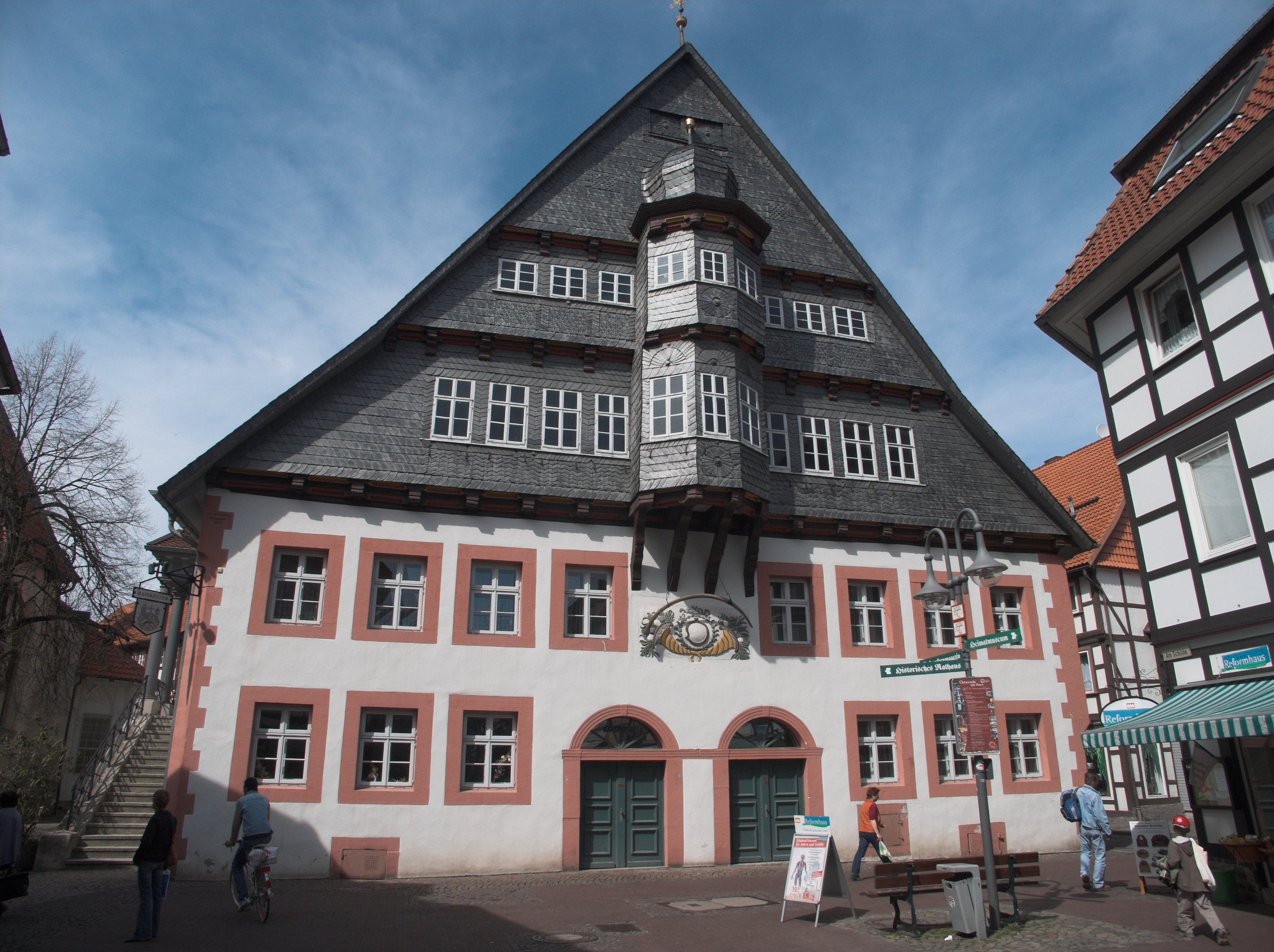 Vorderansicht des alten Rathauses von Osterode am Harz